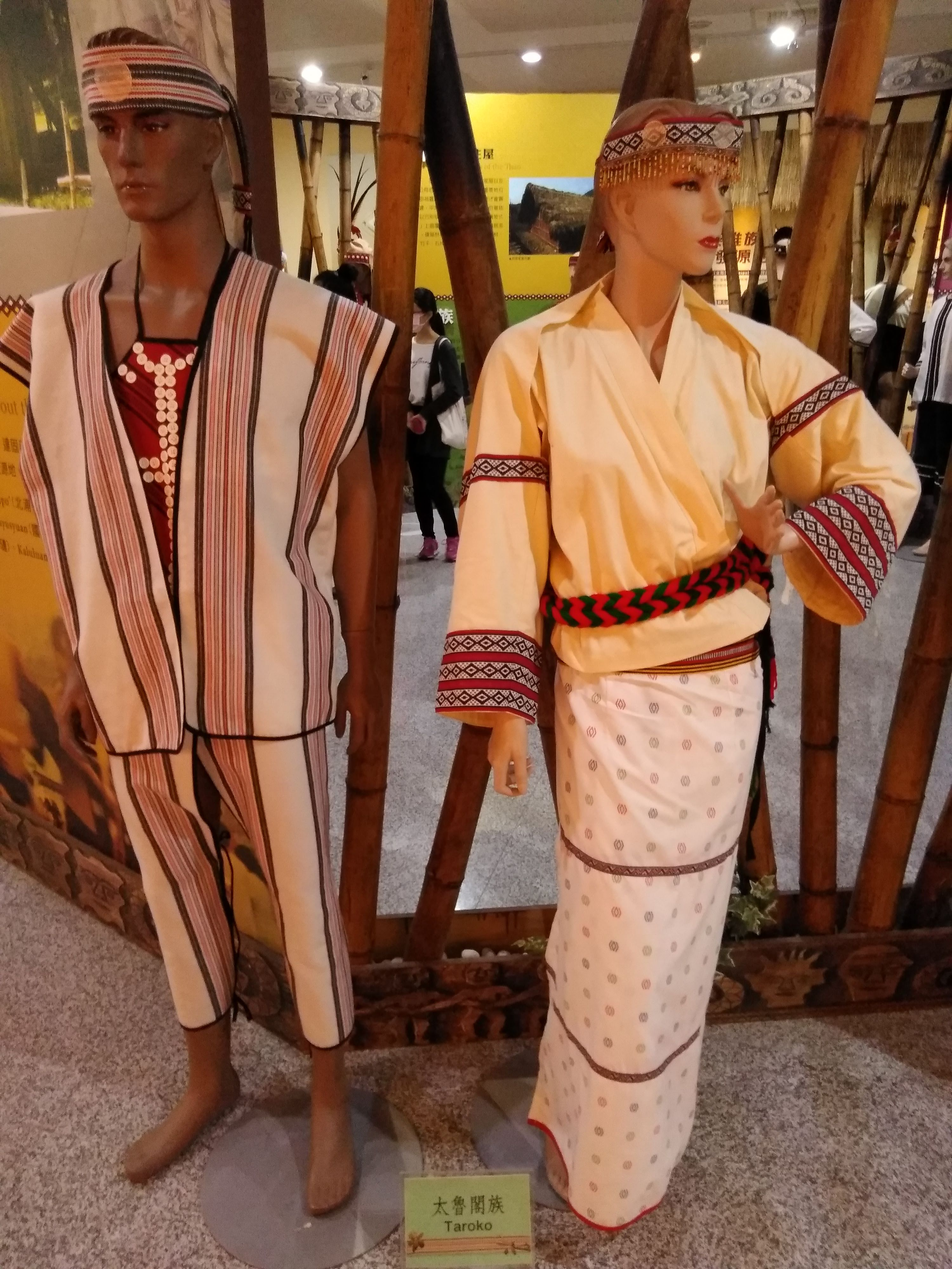 中文（台灣）: 台灣原住民服飾，太魯閣族